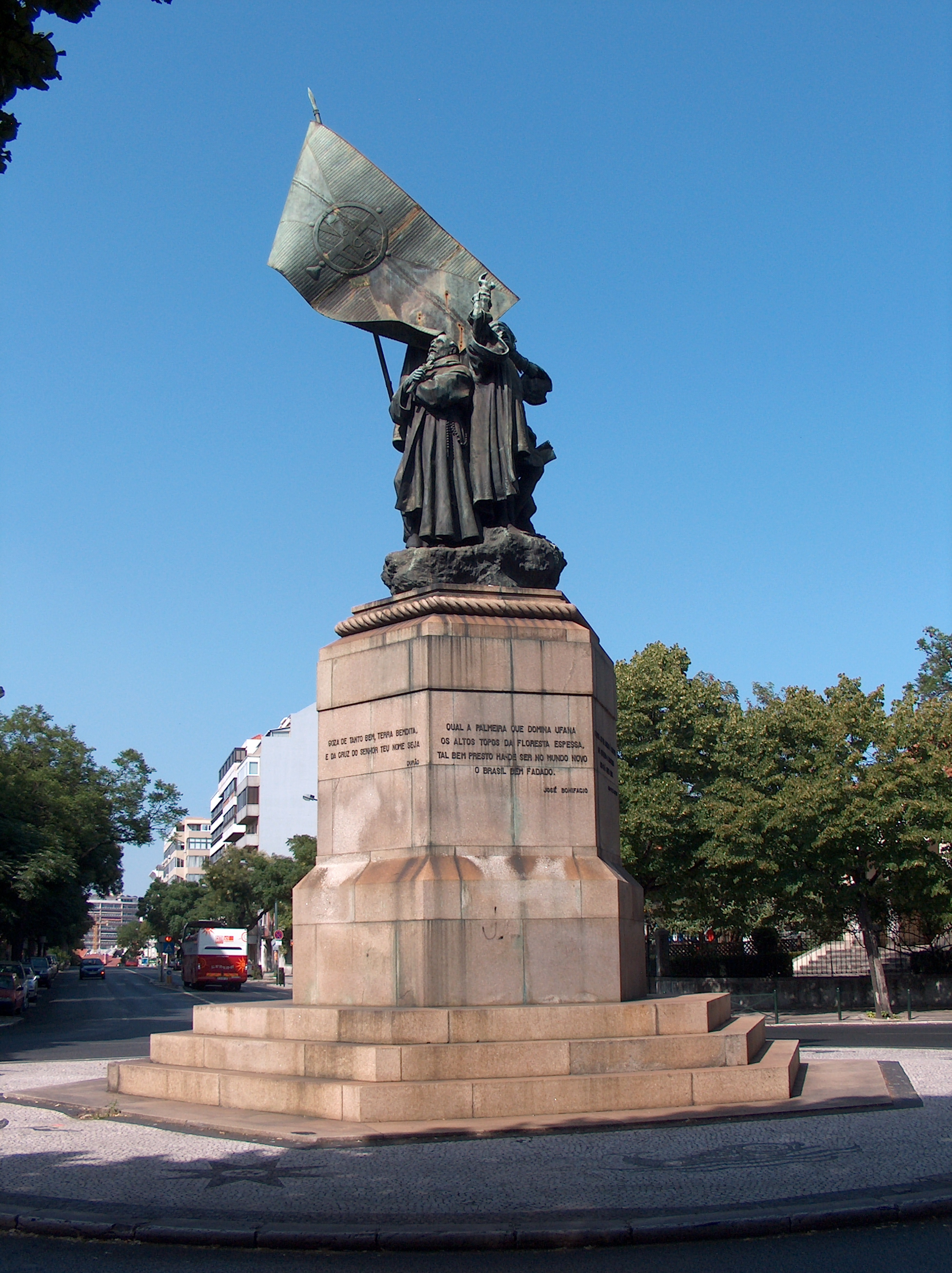 Monumento a Pedro Álvares Cabral em Lisboa